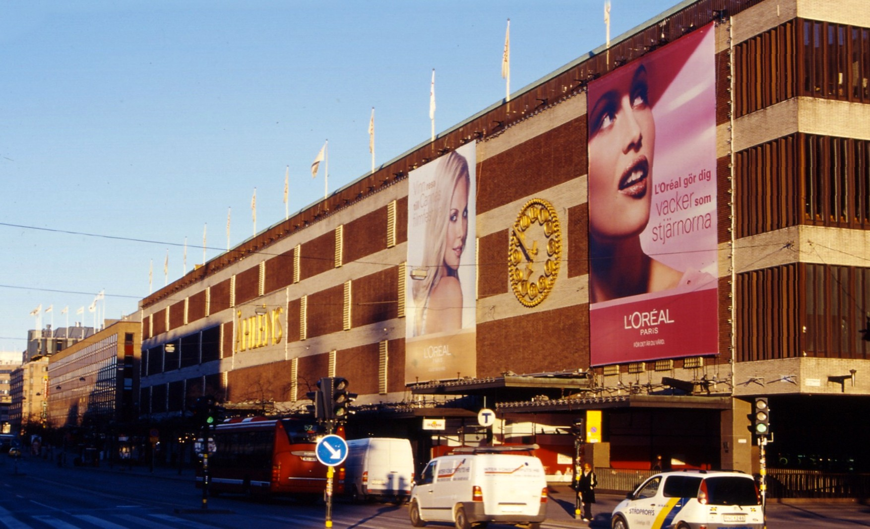 Klarabergsgatan i Stockholm med Åhléns City.